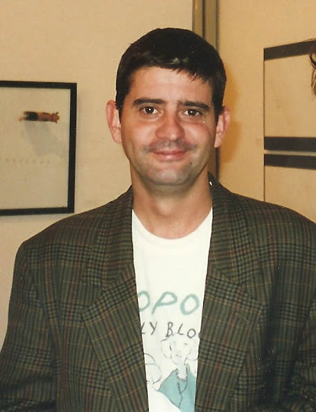 Leopoldo Alas Minguez